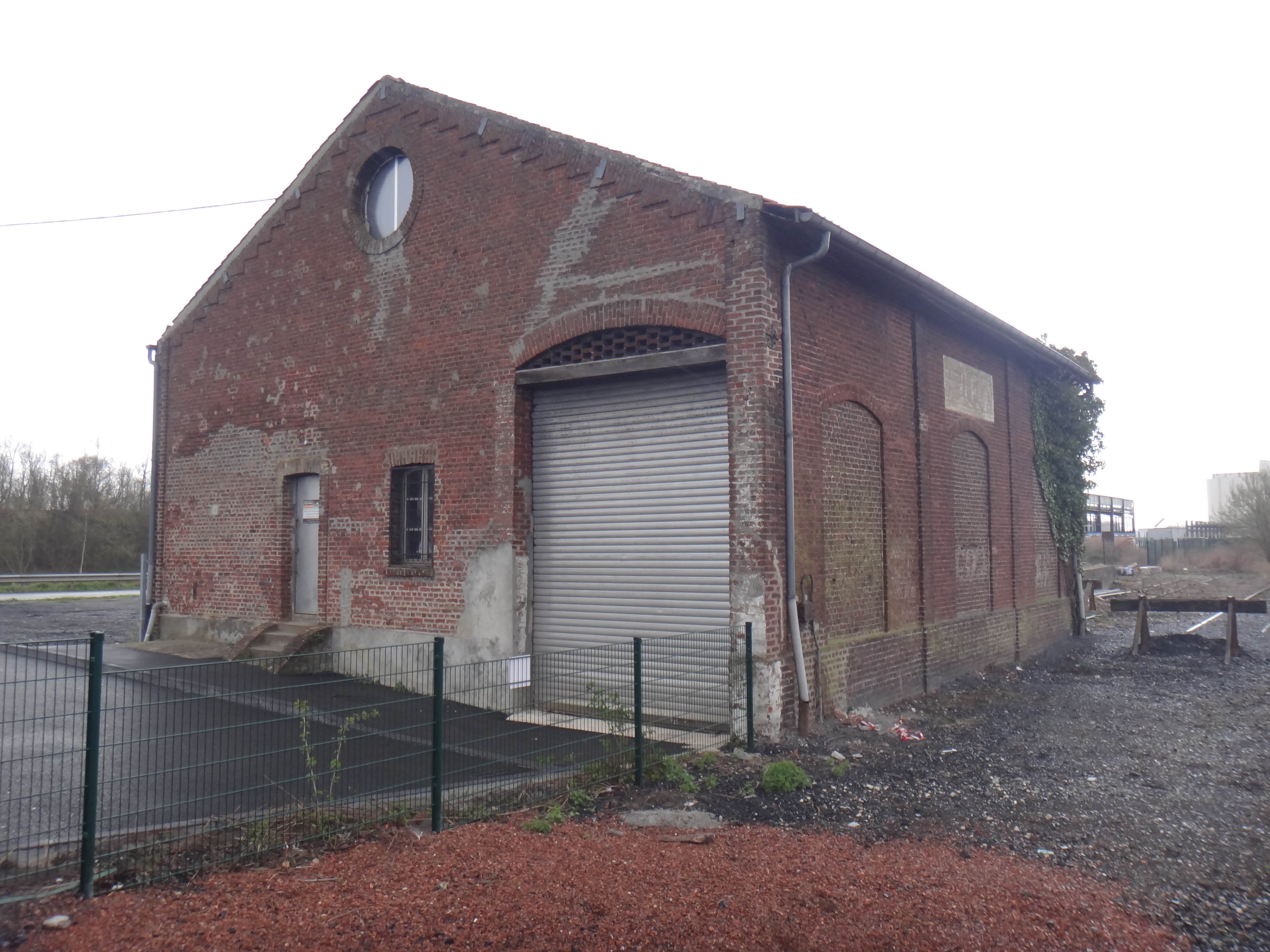 Gare de Arleux, Nord, France, en 2014